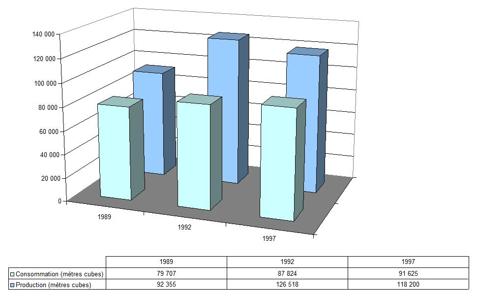 Production et consommation d'eau potable à Tougan (Burkina Faso).